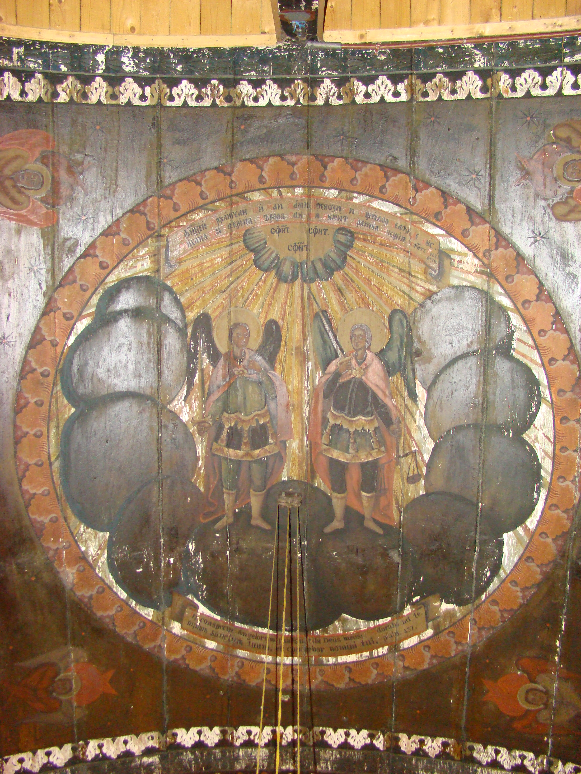 Biserica „Sf. Arhangheli Mihail și Gavriil” din Răstoci, județul Sălaj